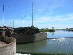 Dique Rincon del Indio en el Rio Atuel de Real del Padre